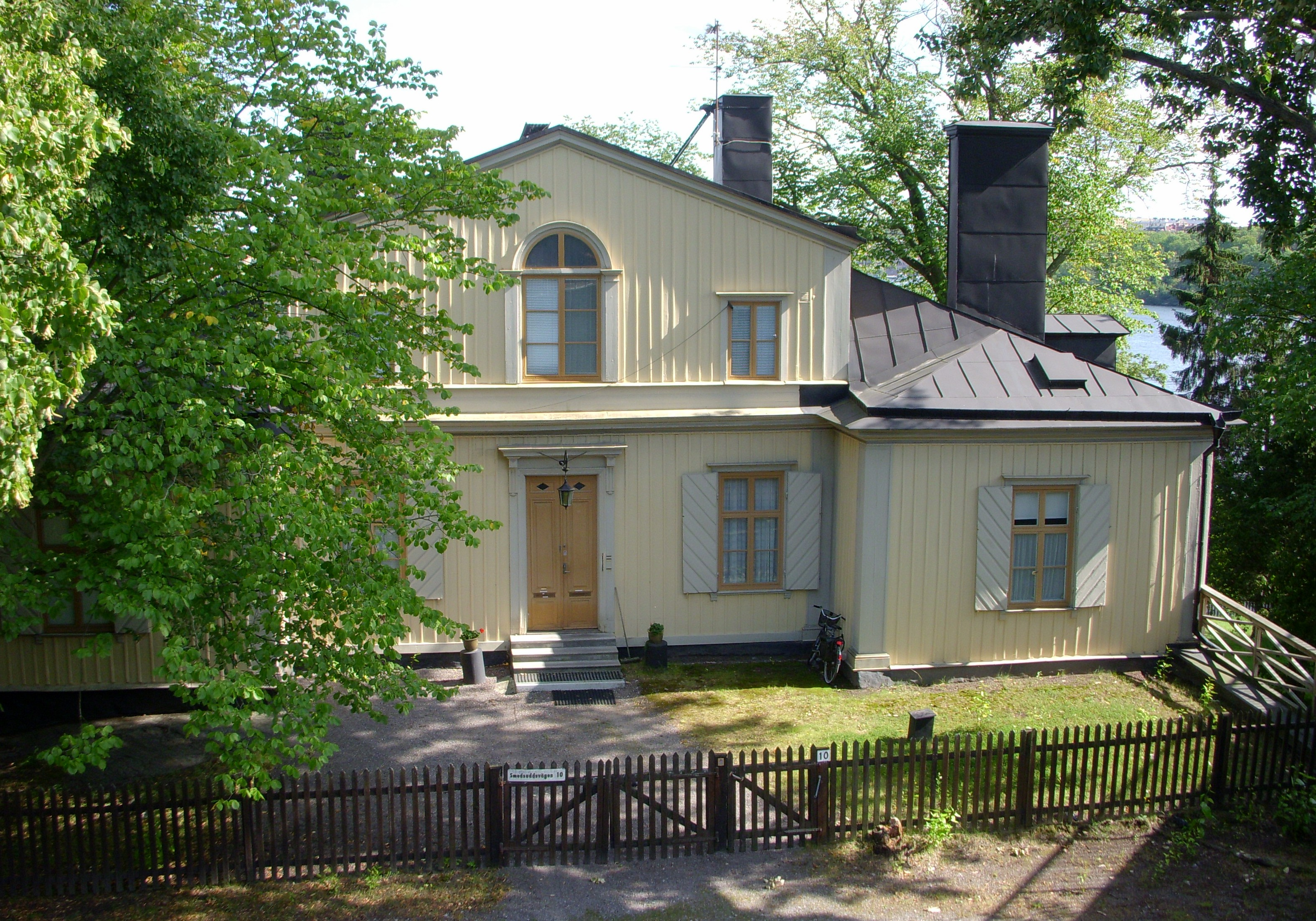 Rålambshovs malmgård, Kungsholmen, Stockholm